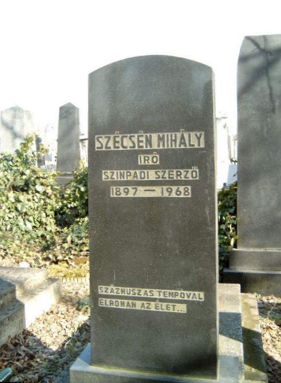 Szécsén Mihály (Budapest, 1897. december 28. – Budapest, 1968. szeptember 15.) író, színpadi szerző, filmforgatókönyv-író sírja Budapesten. Kozma utcai zsidó temető: 5B-9-3